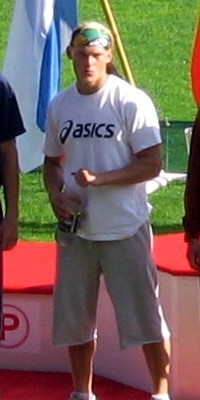 Matti Mononen Kalevan kisoissa, Ratinan stadionilla, Tampereella, 26. heinäkuuta 2008